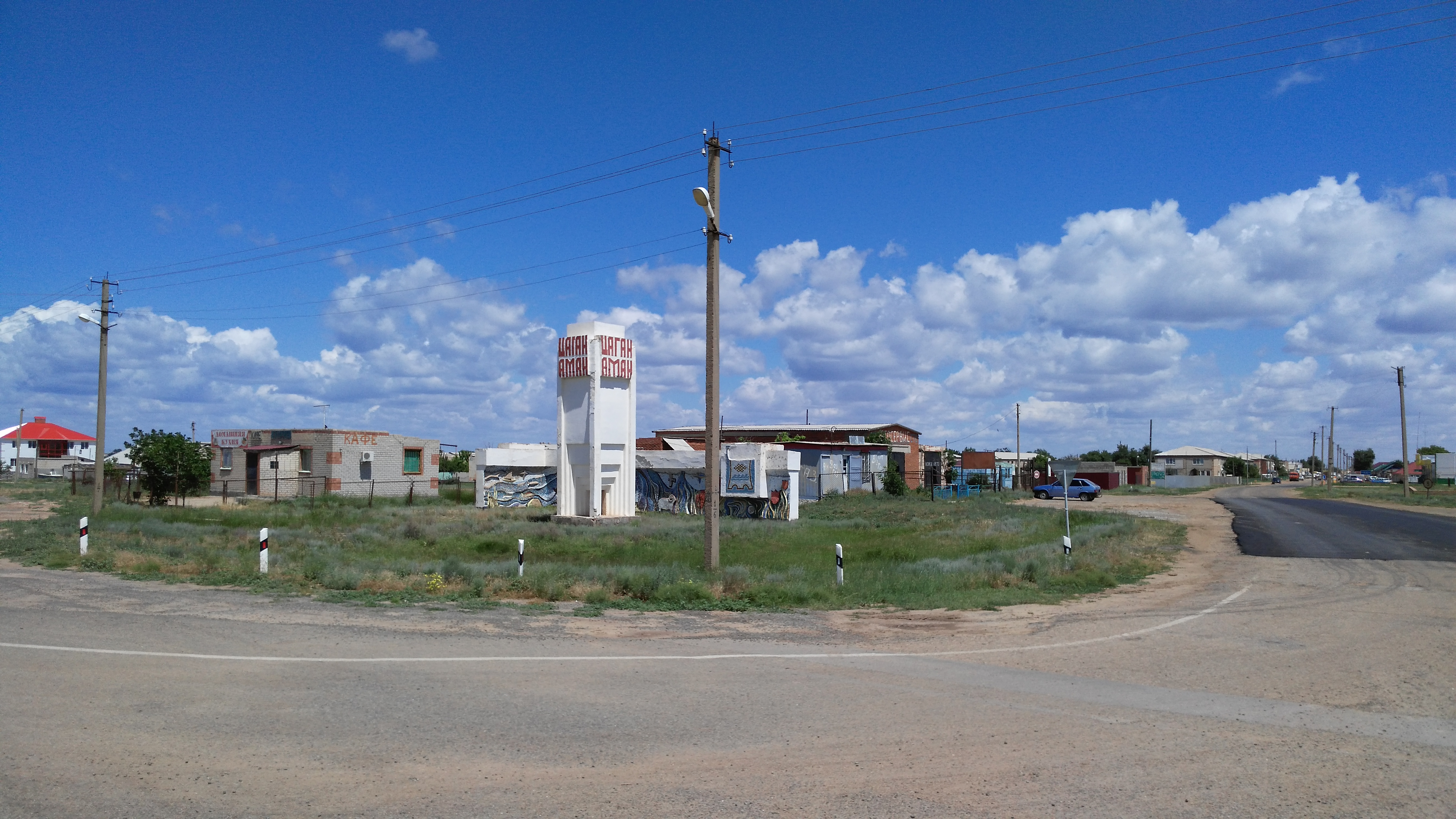 Вид на посёлок Цаган Аман со стороны трассы М-6, 2016 год